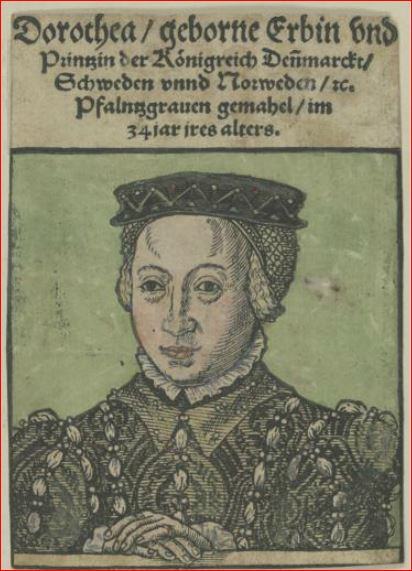 Bildnis der Pfalzgräfin bei Rhein Dorothea Dorothea (gest. in Neumarkt/ Oberpfalz); Ab 1535 Gattin des 1556 verstorbenen Kurfürsten Friedrich II. von der Pfalz. Kolorierter Holzschnitt vermutlich Deutschland um 1554 rechteckig & gerahmt, 115 x 82 mm (Blatt); - (Platte), 1 Stock (Bildnis) Blatt wurde links und unten bis in den Stock beschnitten. Titel: Dorothea/geborne Erbin vnd / Prinzin der Königreich Denmarckt/ / Schweden vnnd Norweden/rc. / Pfalntzgrauen gemahel/im / 34 jar ires alters., Name (Dargestellter) & Titel (Dargestellter) & Alter (Dargestellter), 5-zeilig & zentriert, Anbringungsort: über der Darstellung, Typendruck, deutsch, Schriftart: Minuskel Nürnberg, Germanisches Nationalmuseum, Graphische Sammlung, Inventar-Nr. P 26620, Kapsel-Nr. 860